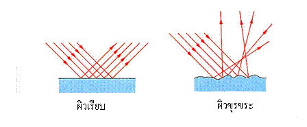 ผิวเรียบ ผิวขรุขระ